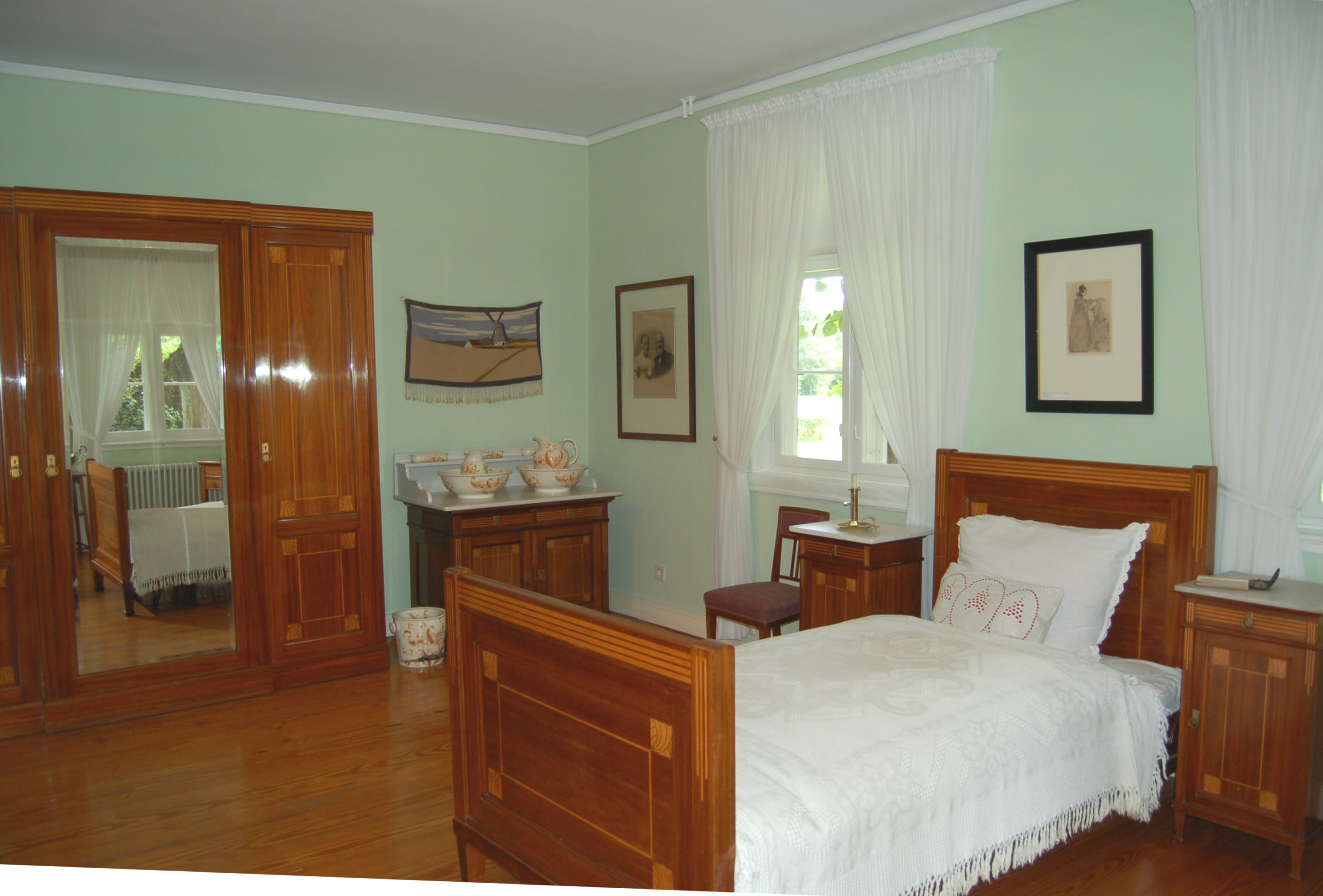 Museum Langes Tannen Uetersen - Schlafzimmer Neo-Biedermeierzeit um 1910, Blick auf den Schlafzimmerschrank und Waschtisch